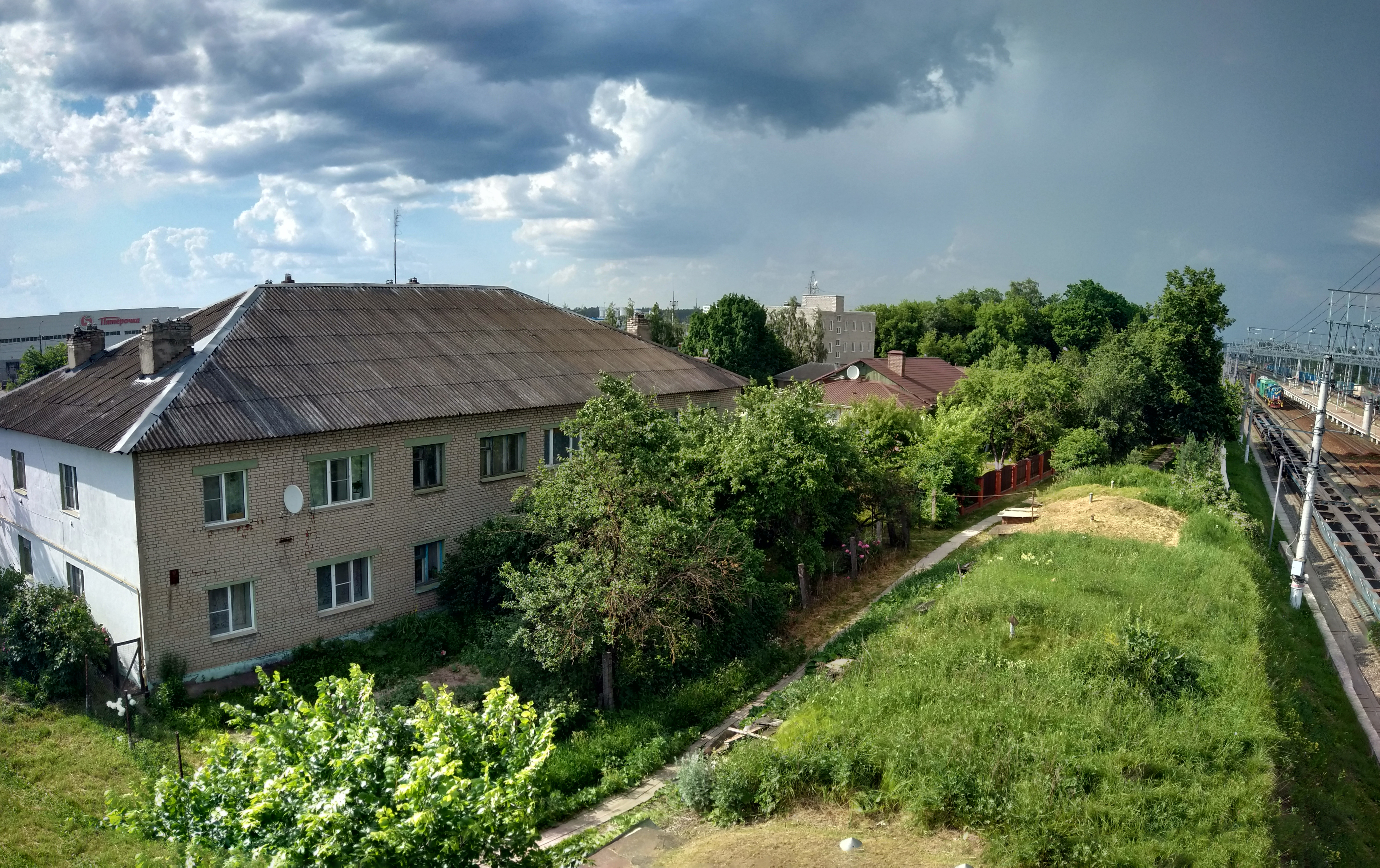 Панорама с пешеходного моста станции Ворсино в Калужской области